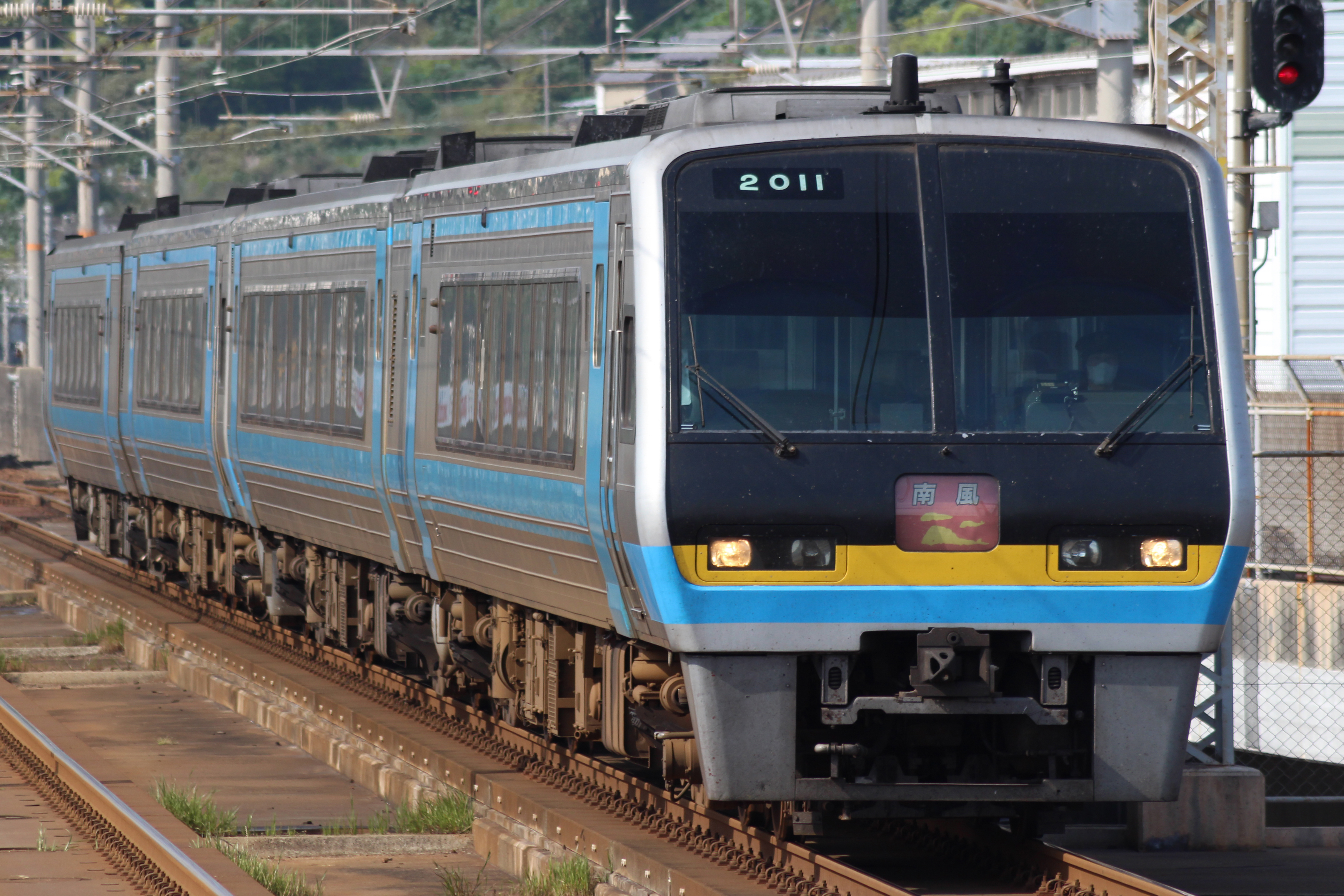 児島駅に入線してくる2000系